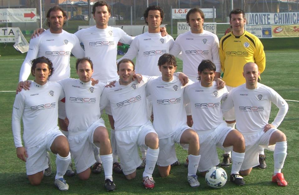 cosmosrooster